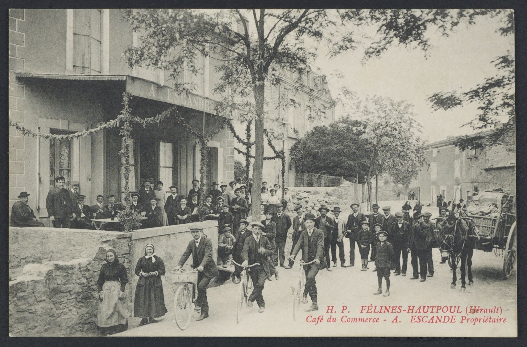 Félines-Hautpoul. - Café du Commerce, A. Escande propriétaire : carte postale.